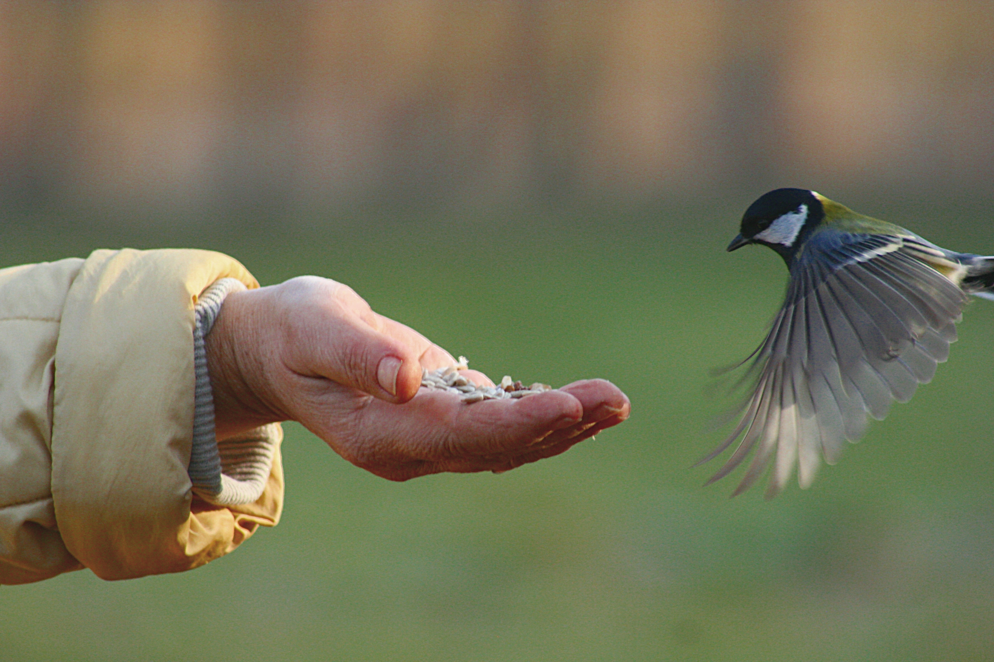 Great Tit, Sikora bogatka